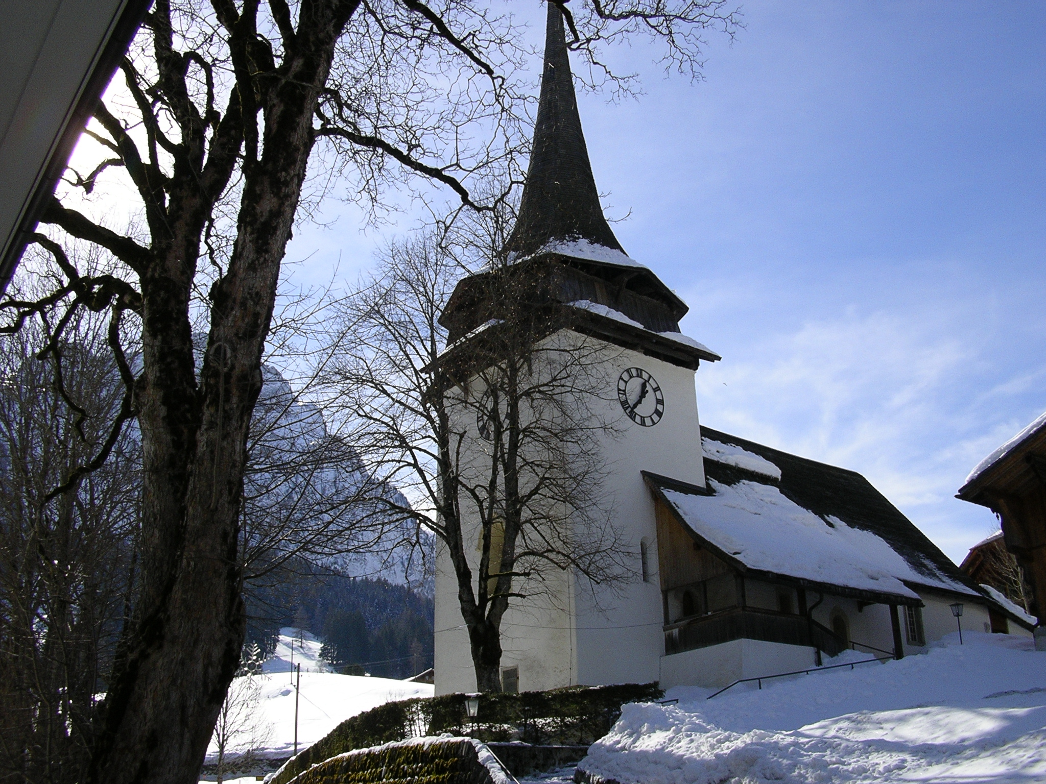 Église Saint-Théodule de Gsteig (BE)